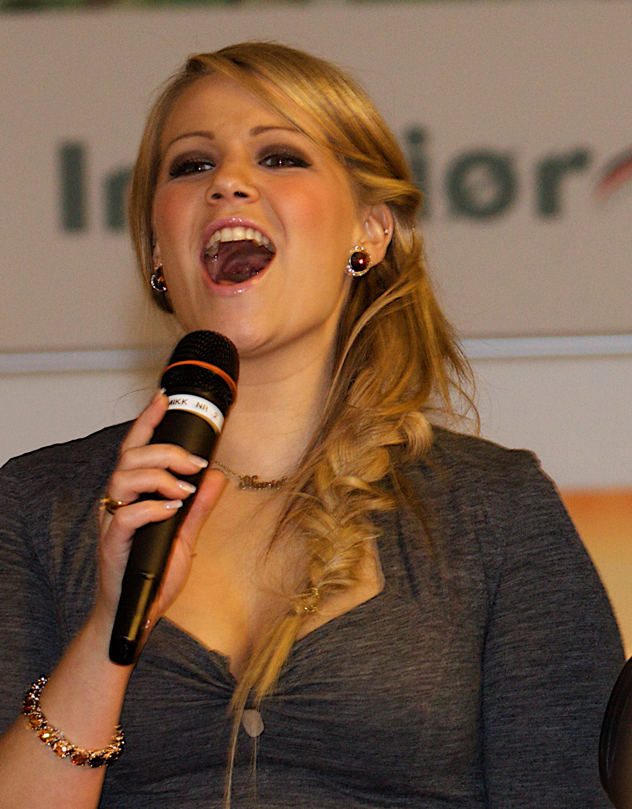 MGP 2009 CD-lansering